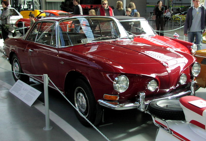 Volkswagen 1600 (Type 34)